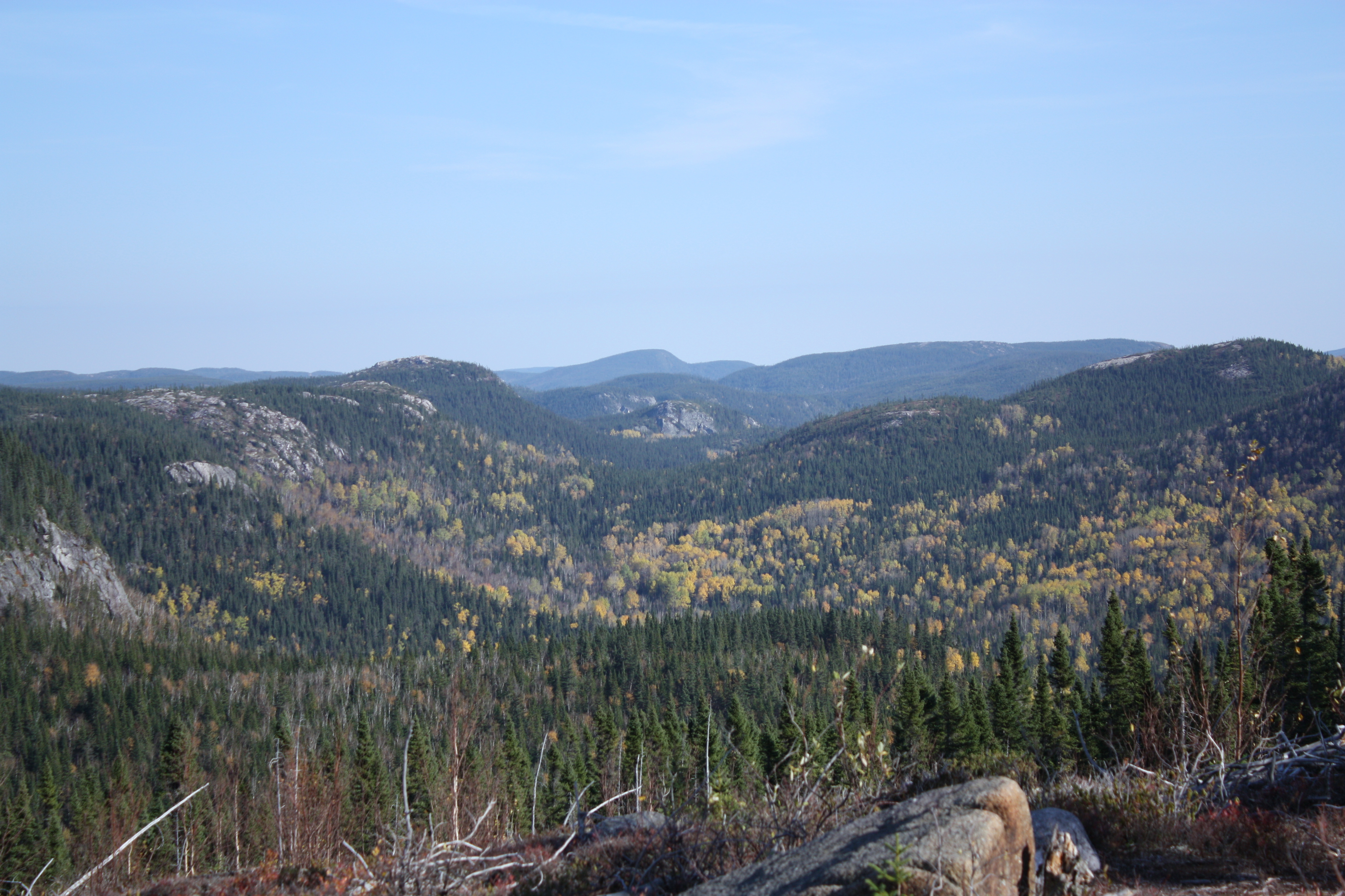 Français cadien: le sommet du lac des Cygnes est le trésor du parc des Grands-Jardins.